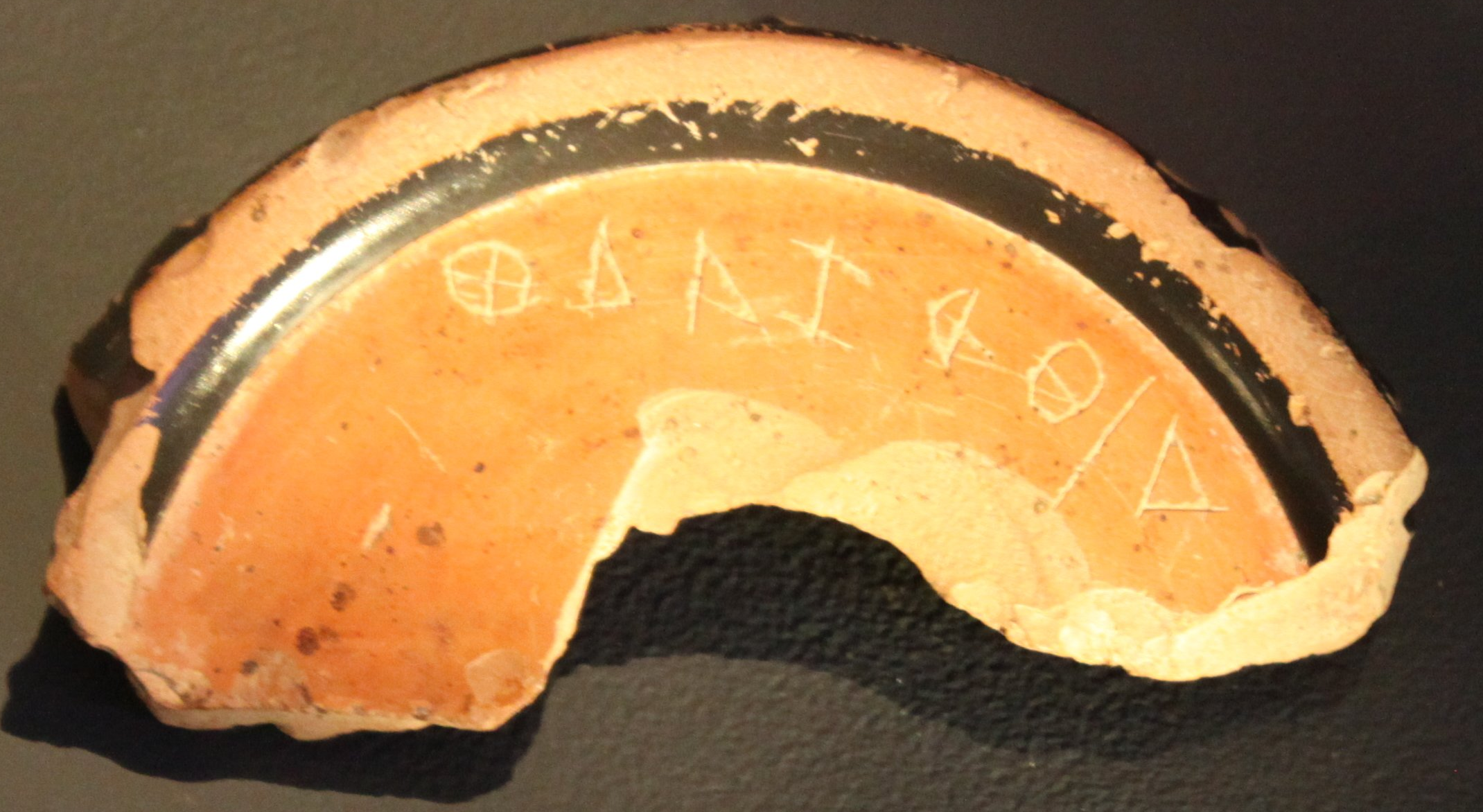 Καρική επιγραφή με το όνομα Κυλαλδης - Αρχαιολογικό μουσείο Θεσσαλονίκης